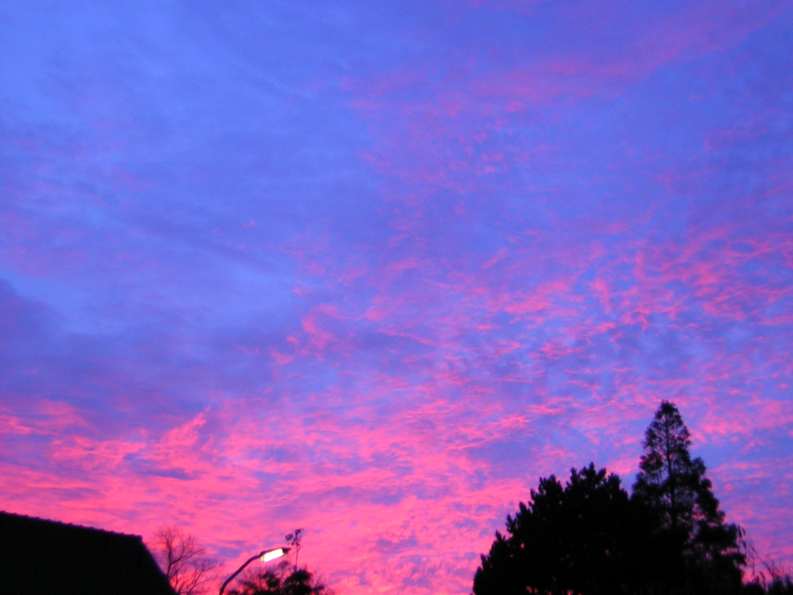 Foto gemaakt door B.T.H. Verzijlbergh, uit eigen collectie